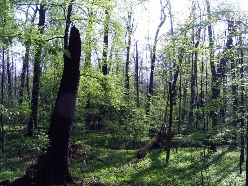 Rezerwat Przyrody Lasek Bielański (Warszawa; Polska)